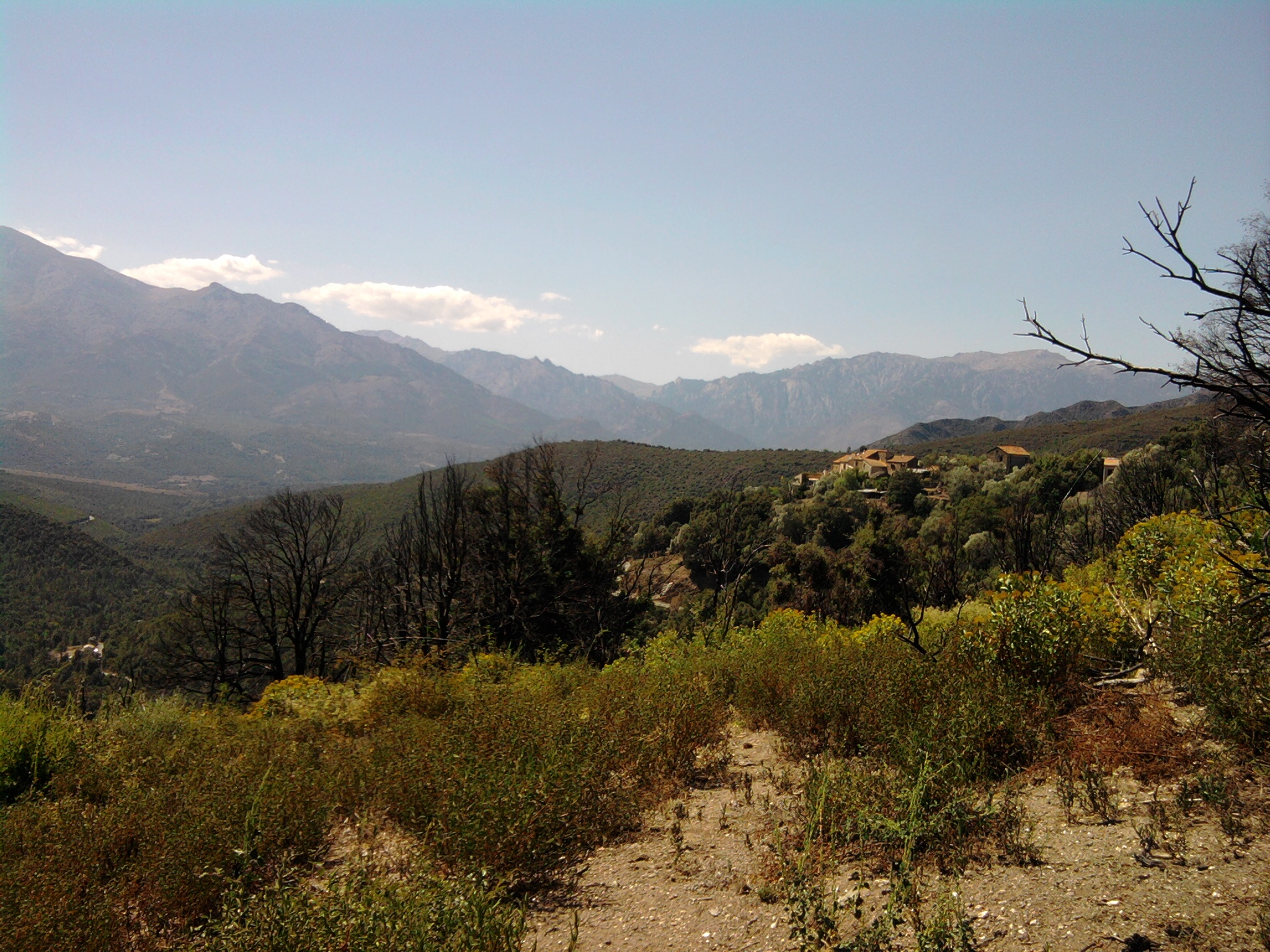 Vue de Favalello di Bozio depuis de vieux jardins abandonnés